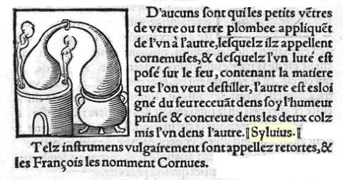 Cornues, avec explications terminées par la source [Sylvius]; extrait de Tresor des remedes secretz par Evonyme Philiatre